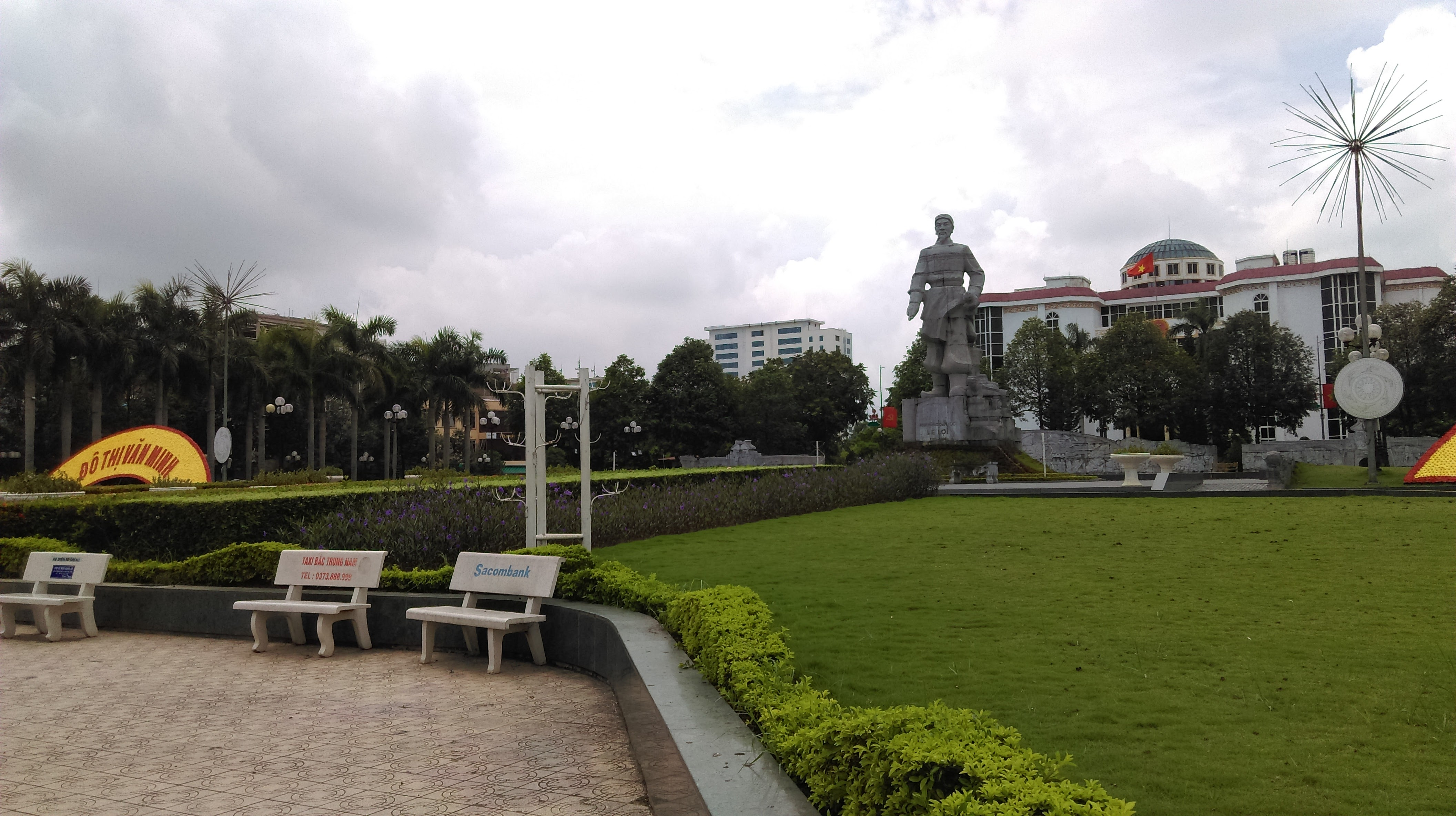 Tượng đài Lê Lợi, Lam Sơn, Thanh Hóa